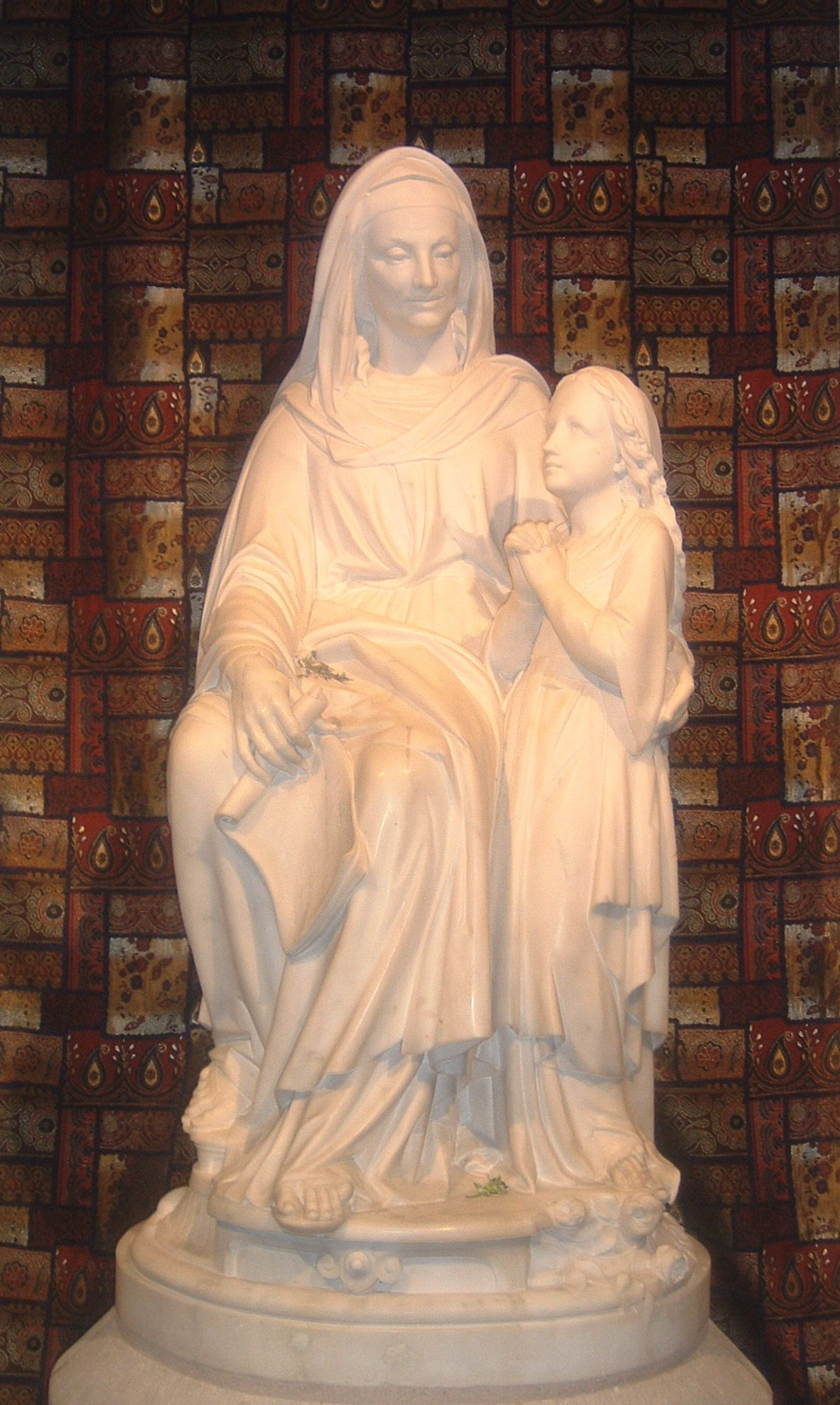 Foto scattata da me l'11 giugno 2008 Statua di Sant'Anna e Maria bambina